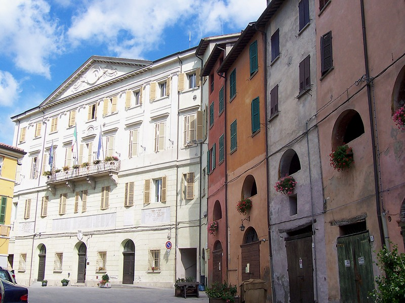 Brisighella - Municipio